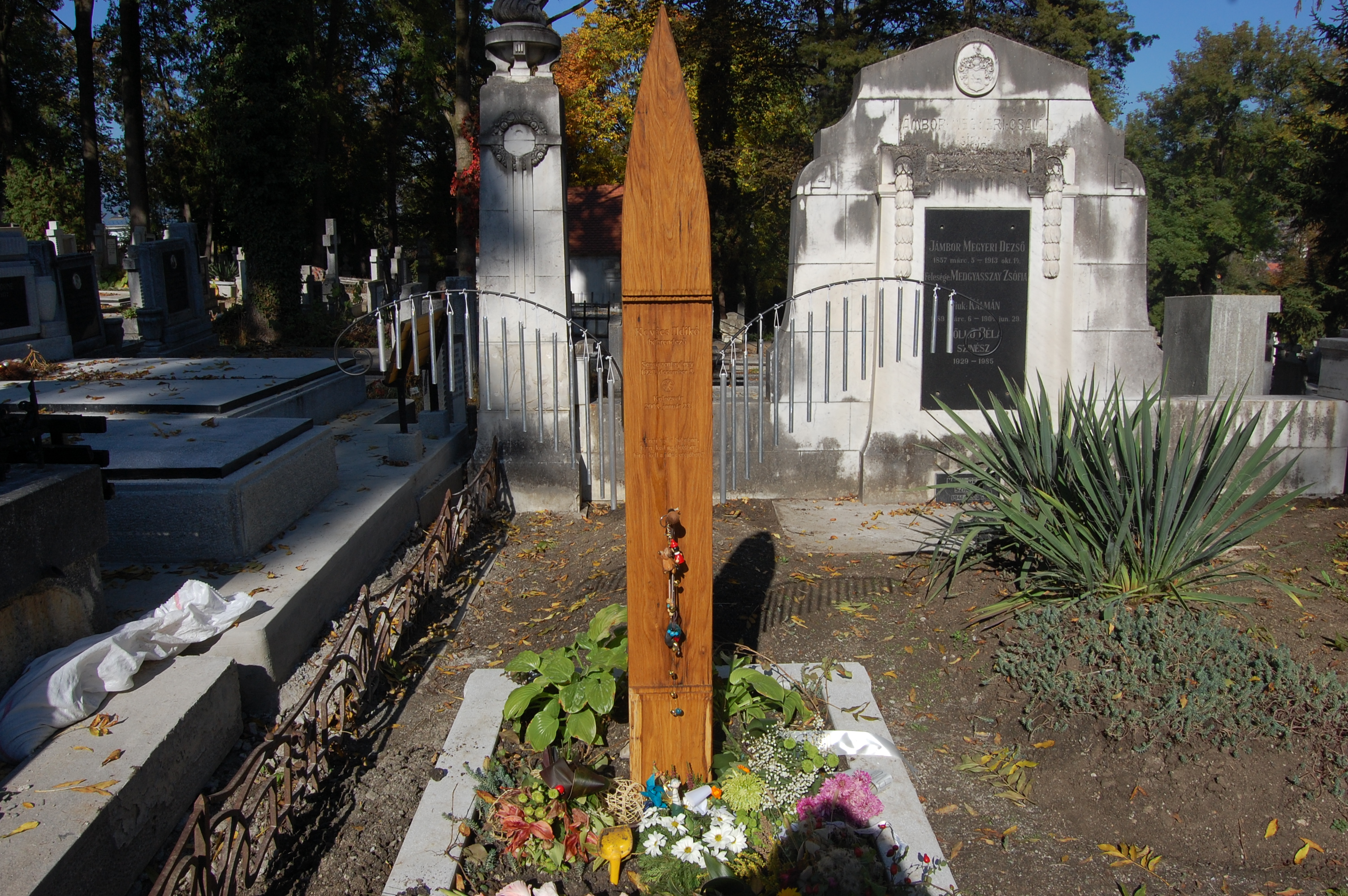 Kovács Ildikó bábrendező sírja a Házsongárdi temetőben